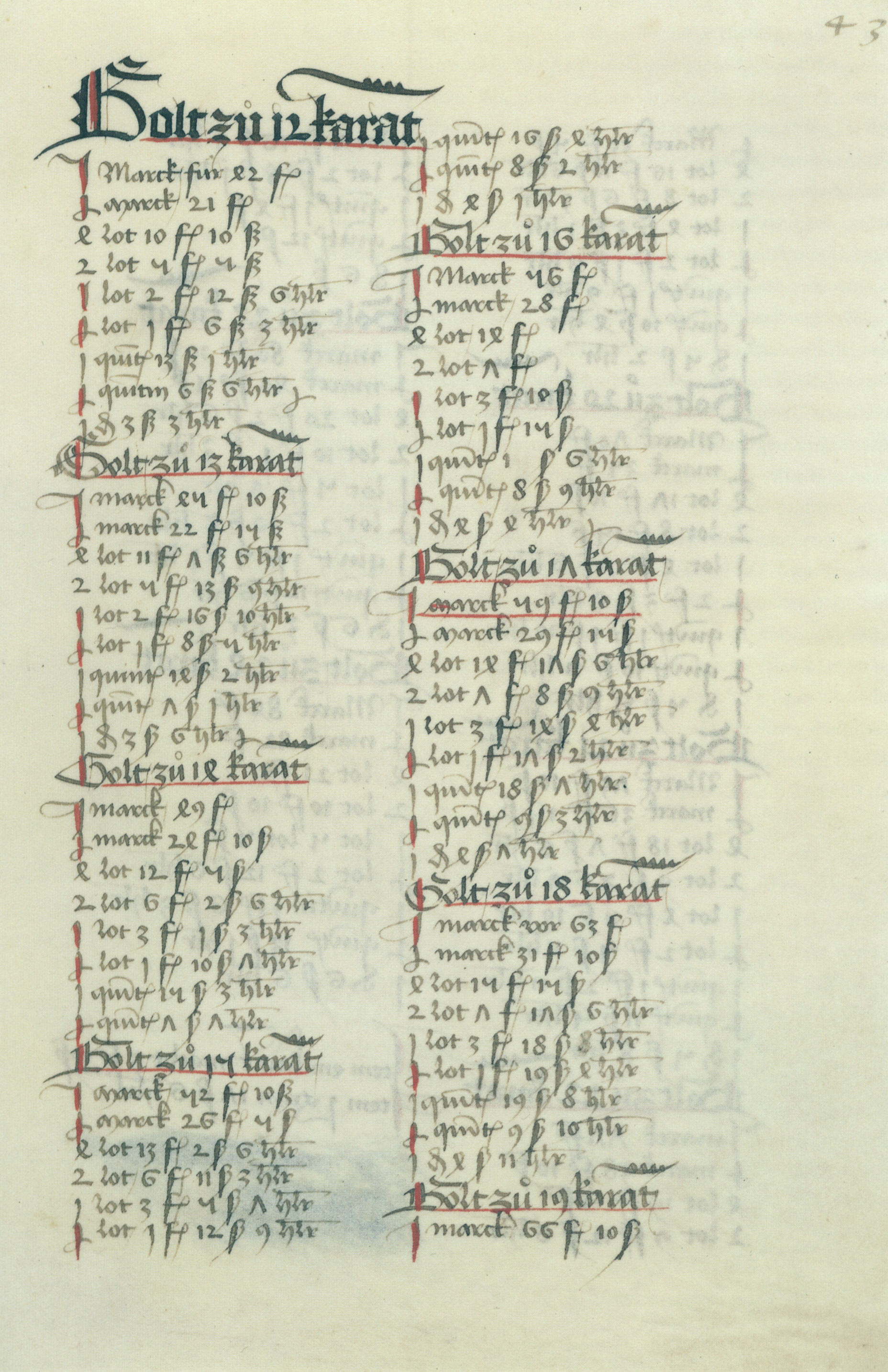 Mittelalterliches Hausbuch von Schloss Wolfegg Fol. 43r: Werttabelle für Gold (Beginn) („Golt zuo 12 karat“ bis „Golt zuo 19 karat“)